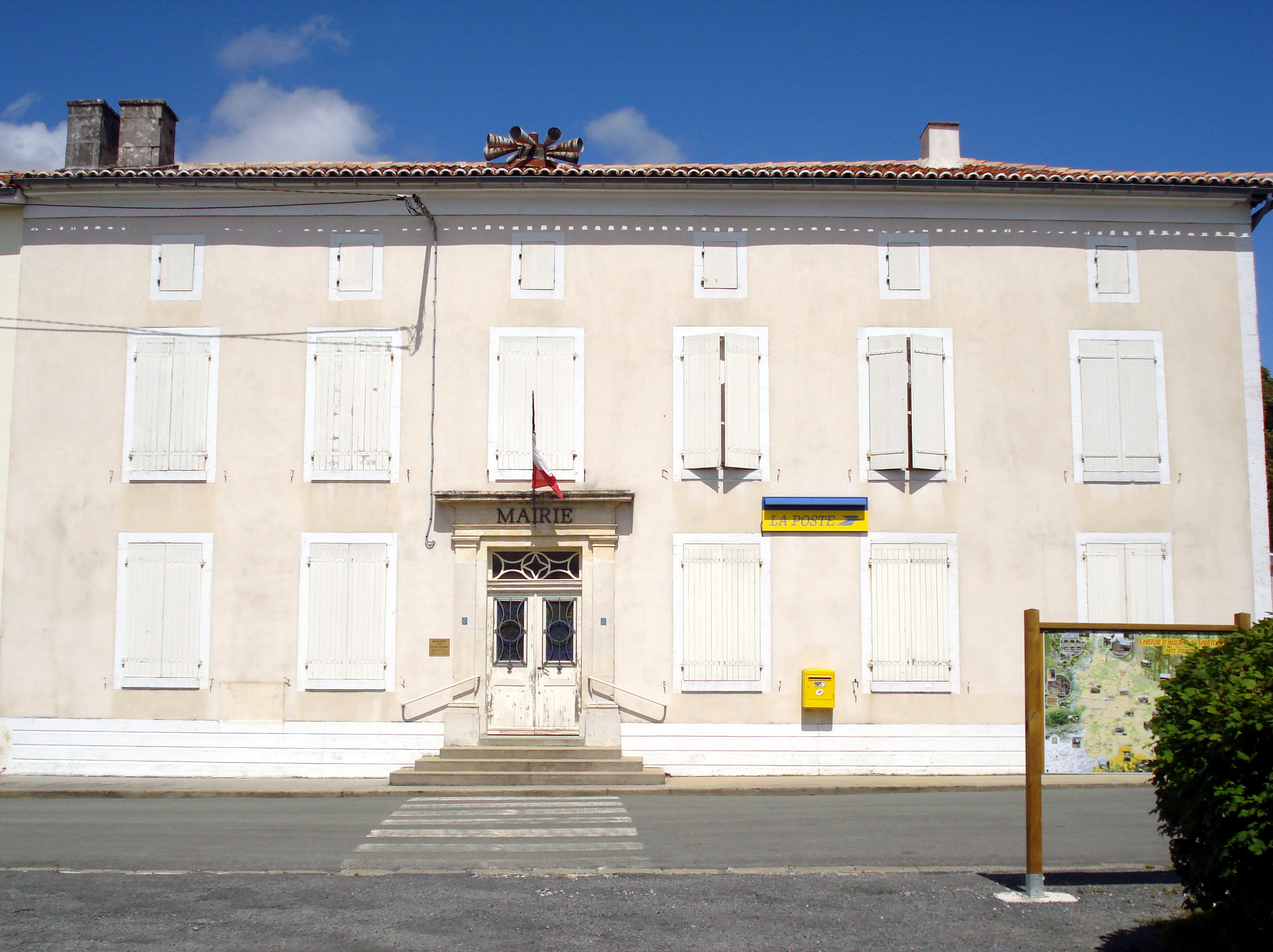 La mairie de Fontaine-Chalendray